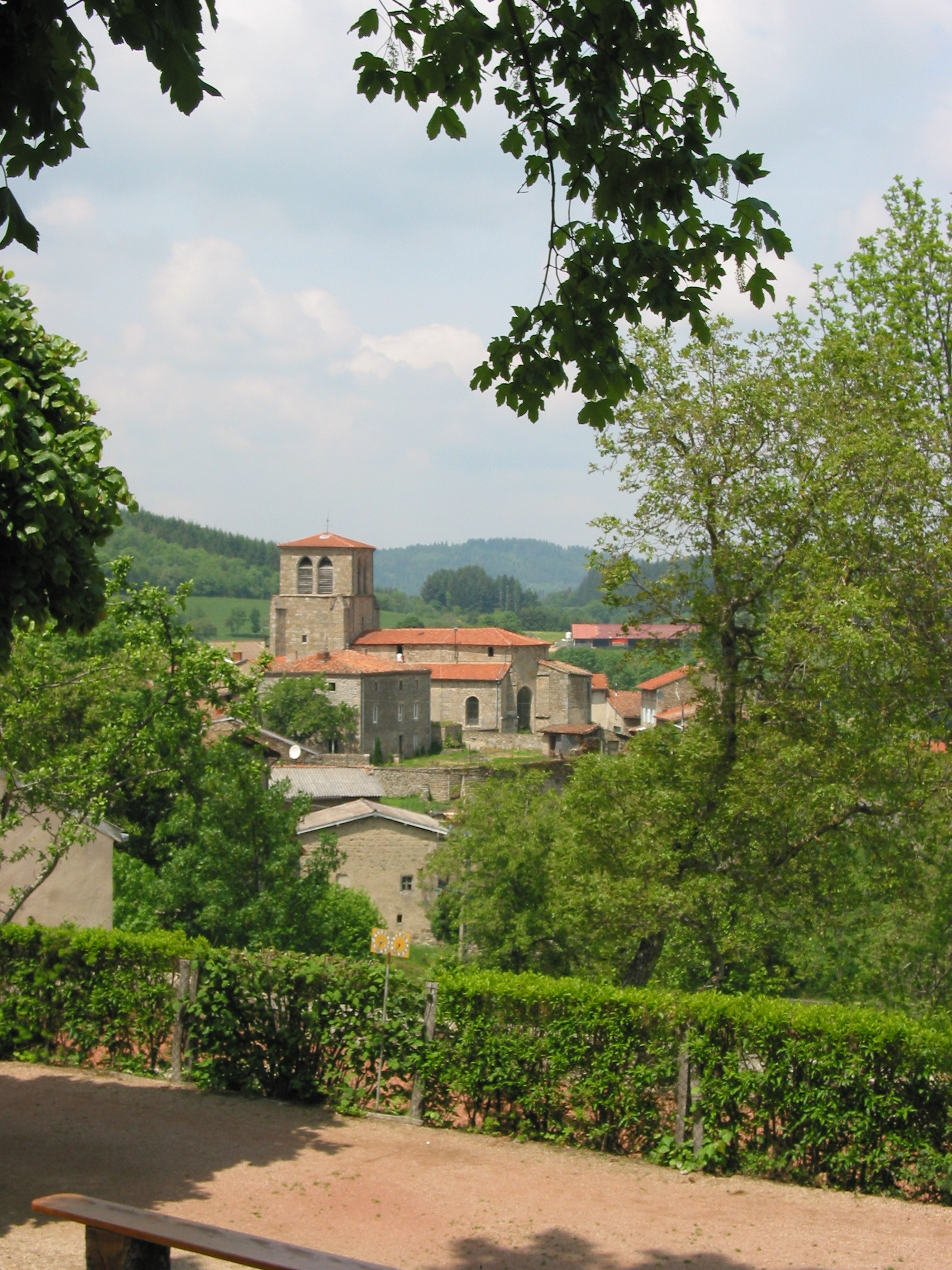 Vue du Village de st jean la vêtre